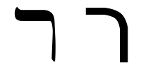 hebrew letter resh